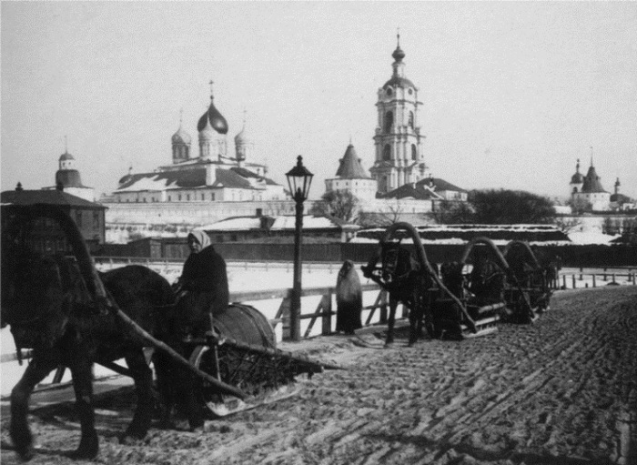 Дореволюционное фото Ставропигиального мужского монастыря со стороны Москвы-реки.